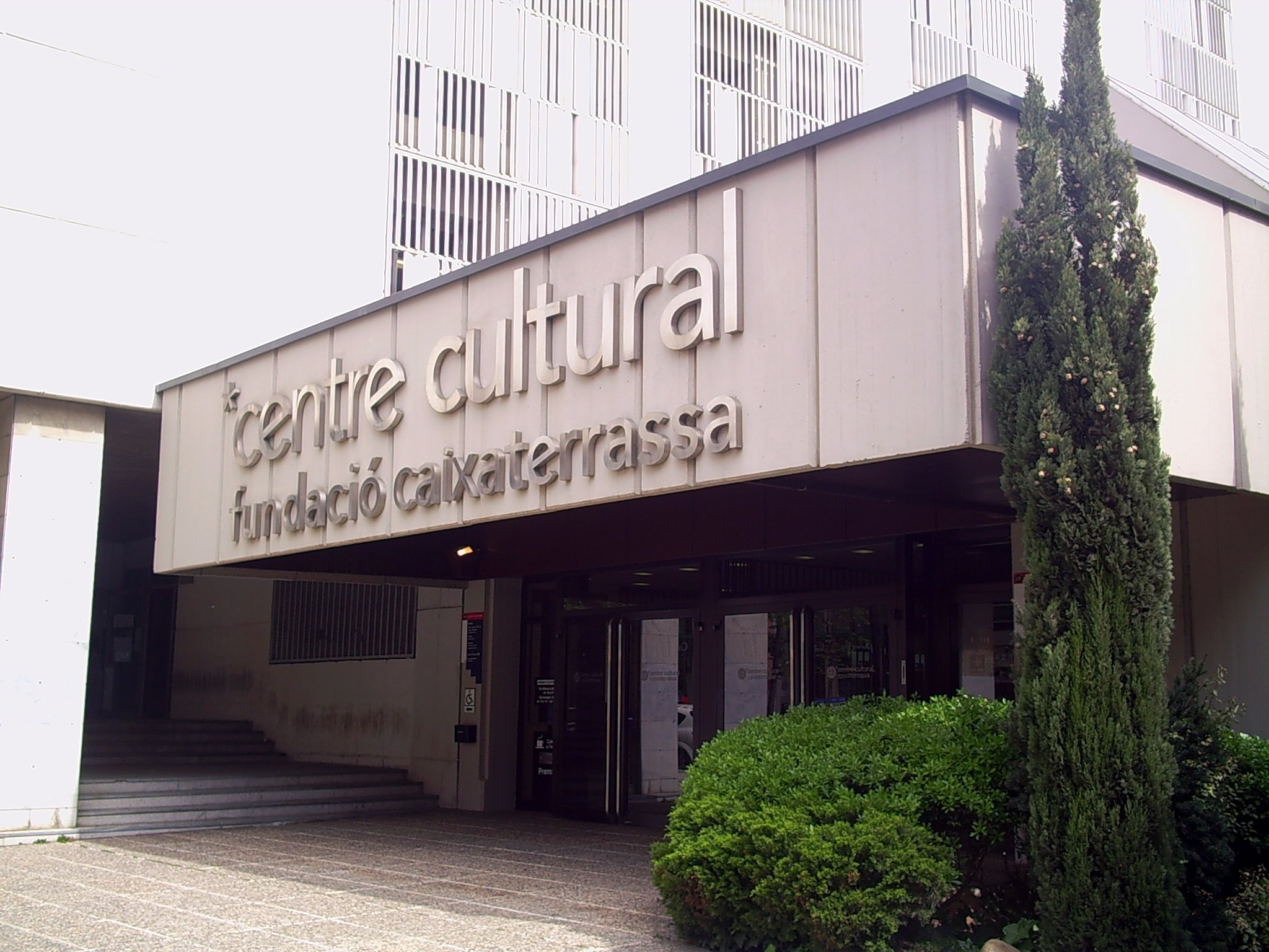 Centre Cultural de la Fundació Caixa de Terrassa, a la rambla Egara, a Terrassa, (Catalunya).